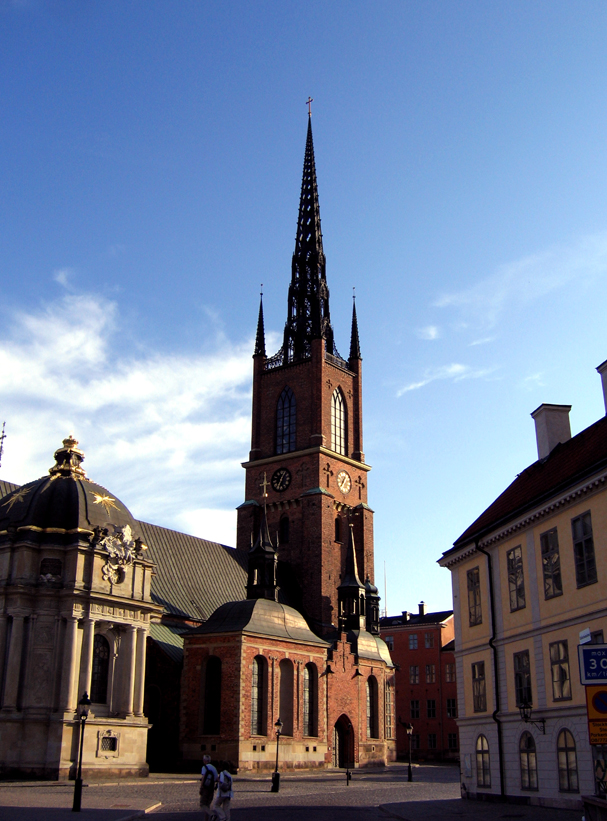 Riddarholmskyrkan